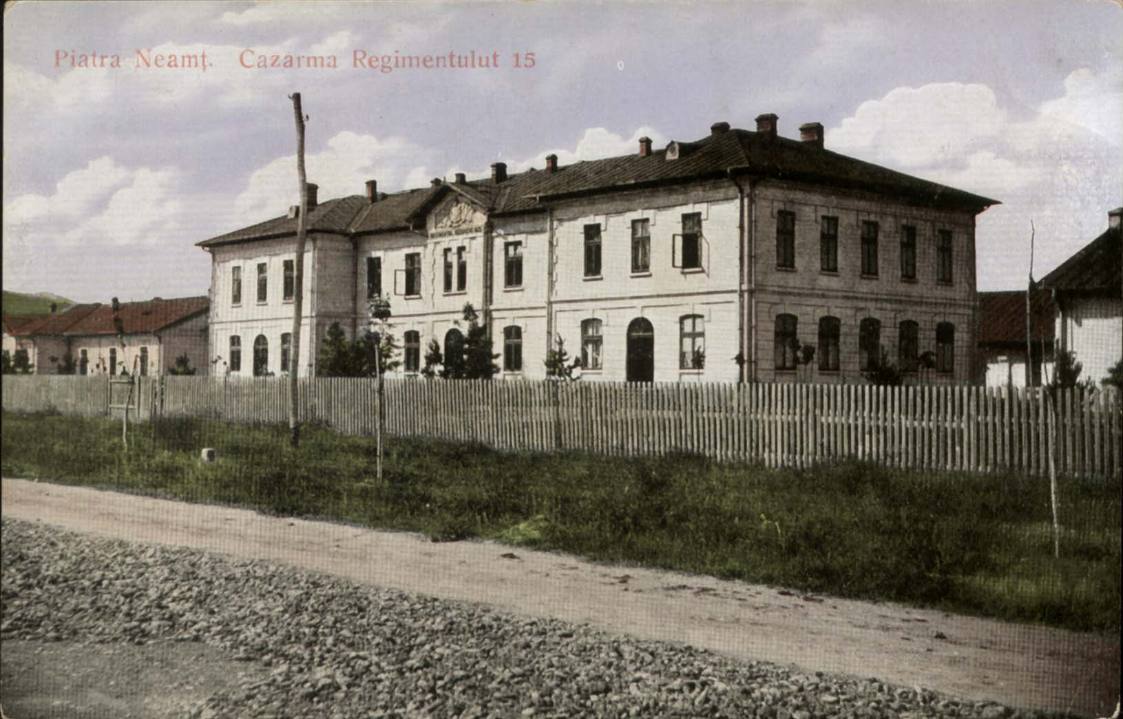 Cazarma Regimentului Războieni No. 15 Piatra Neamț, Româmia - Sec. XX (cca. 1900-1920)